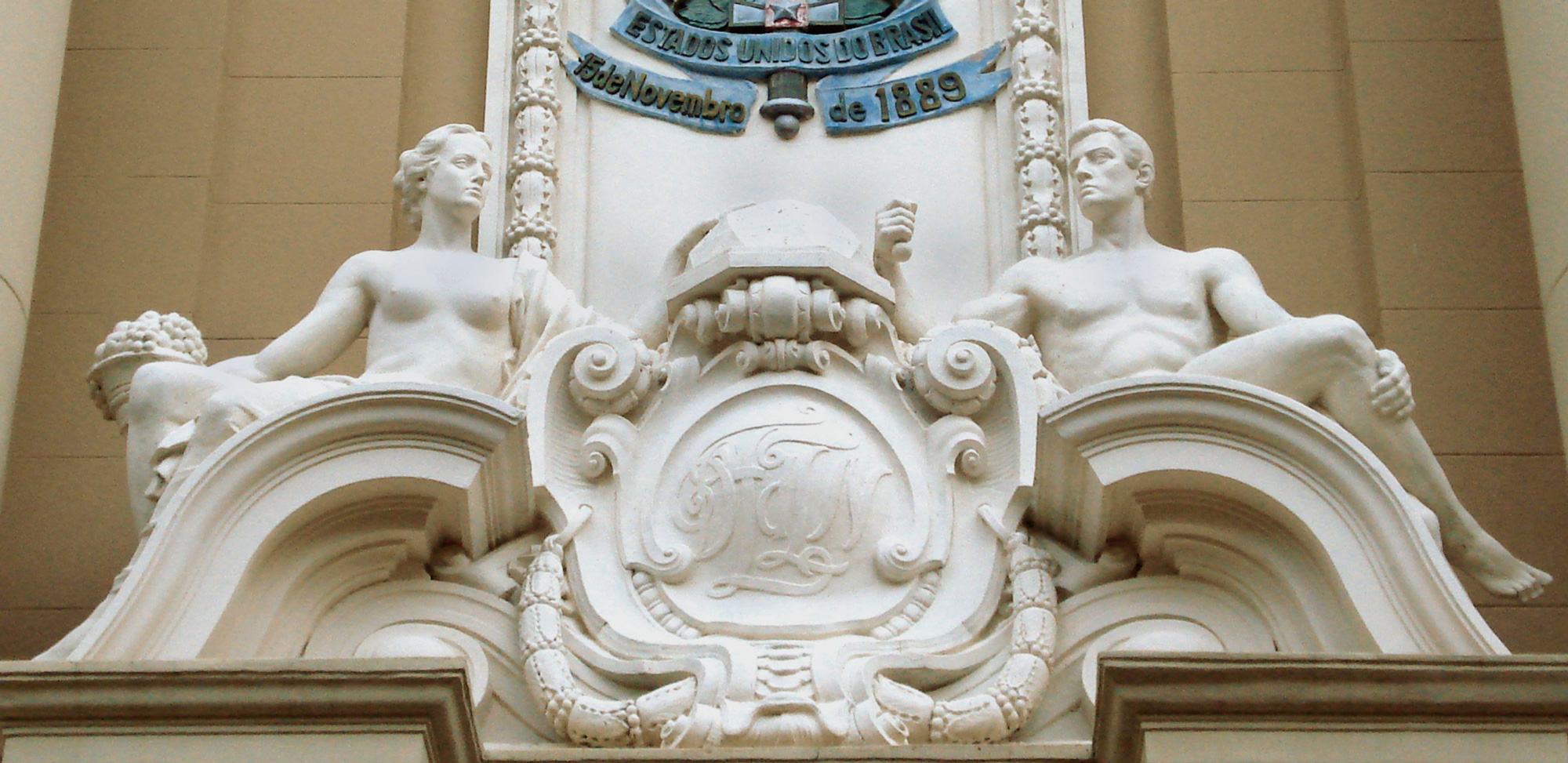 Detalhe do frontispício do MARGS, Porto Alegre, Brasil. Esculturas de Alfred Adloff